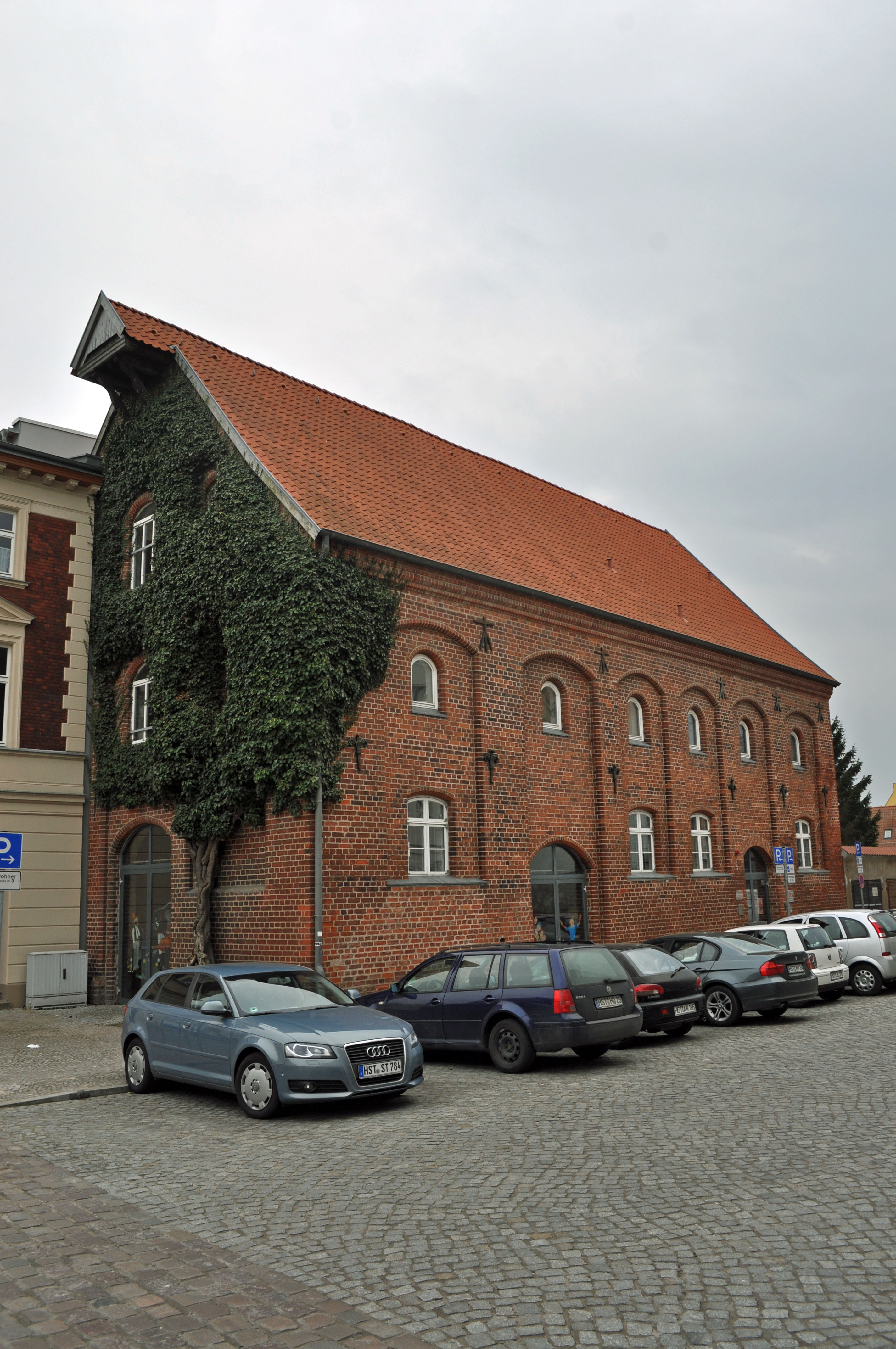 Gebäude bzw. Gebäudedetail in Stralsund. Straße und Hausnummer siehe Dateiname.